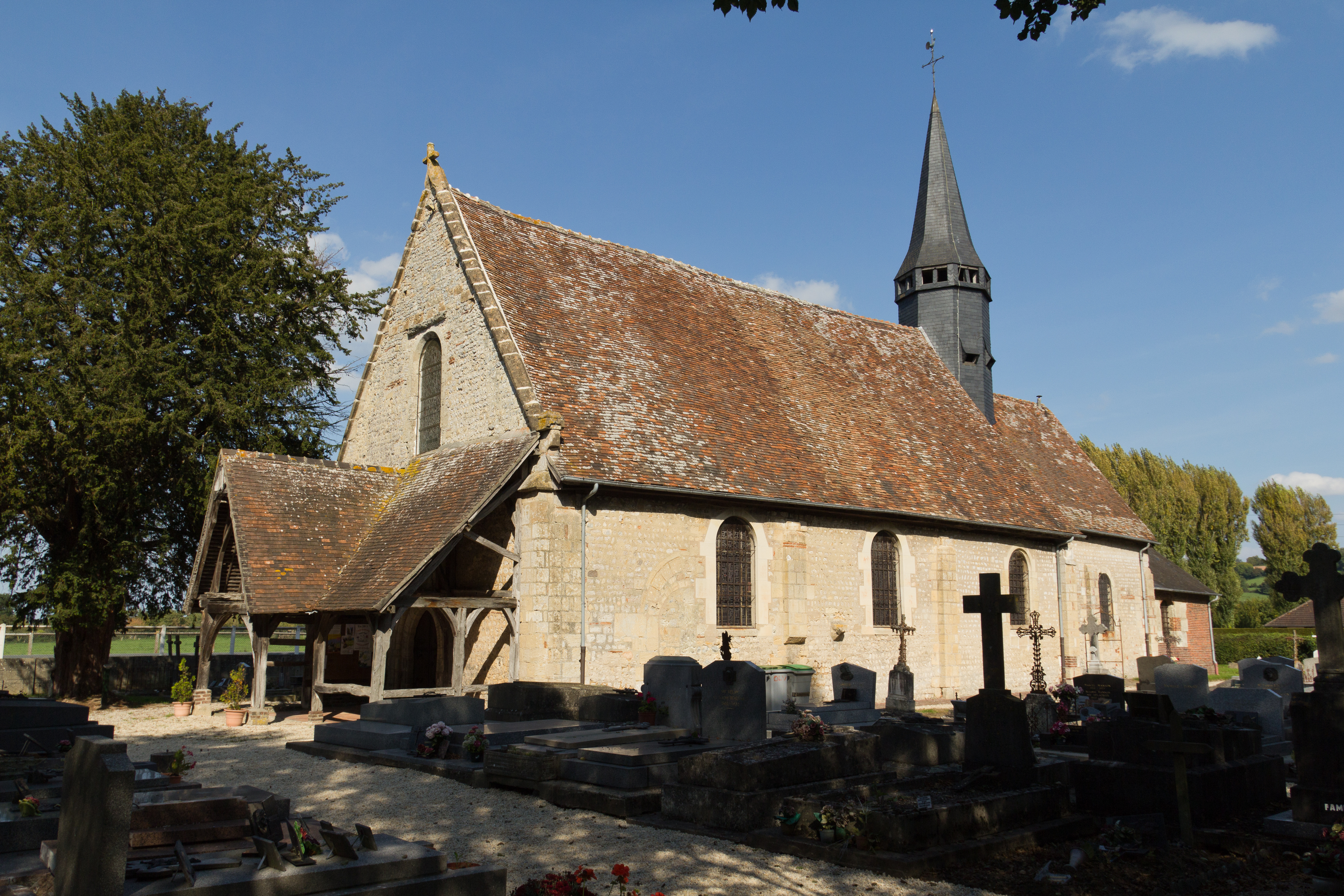 Vue sud-ouest de l'église Notre-Dame d'Ouilly-le-Vicomte. .